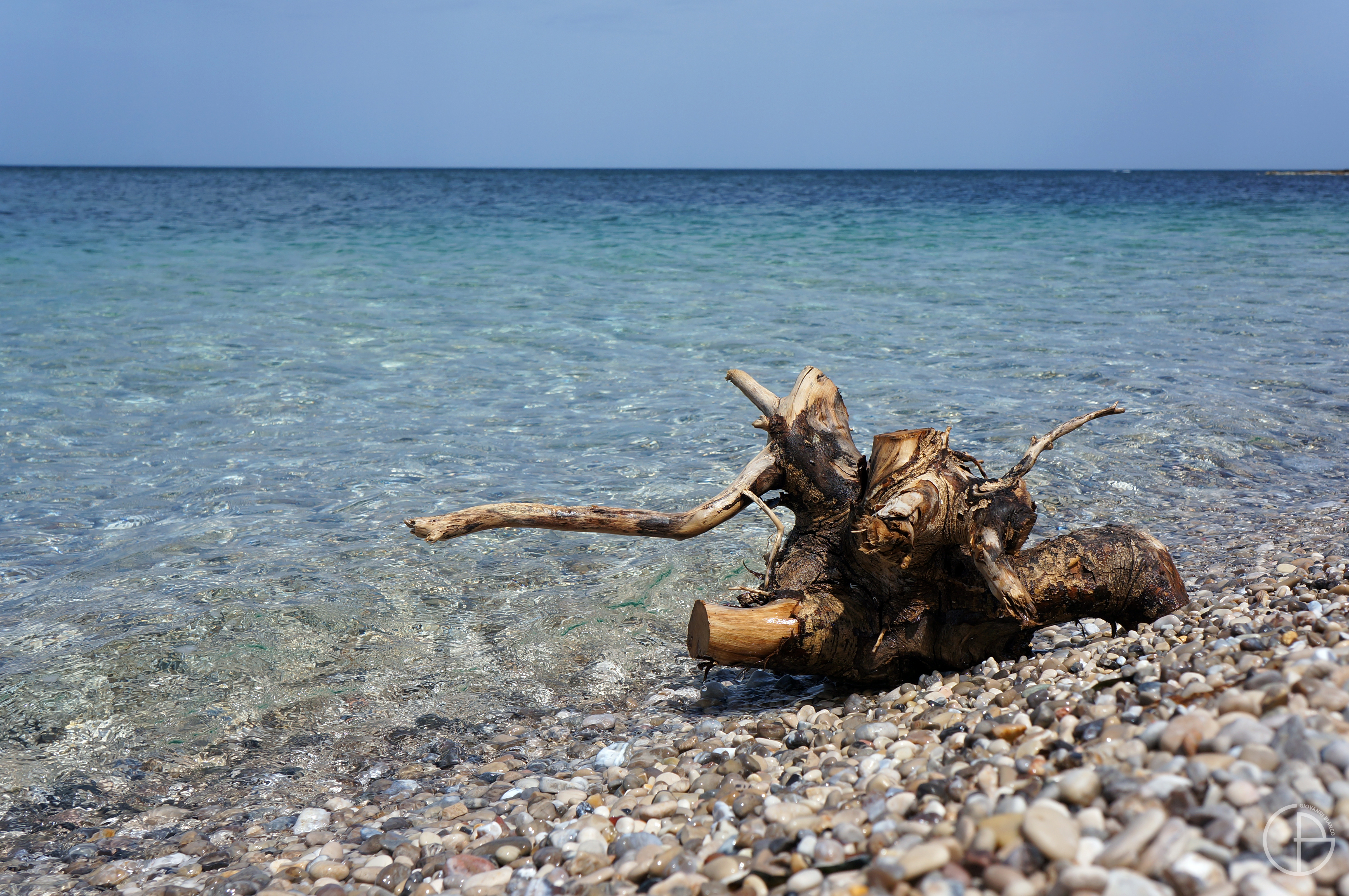 tronco sulla riva di Pizzolungo